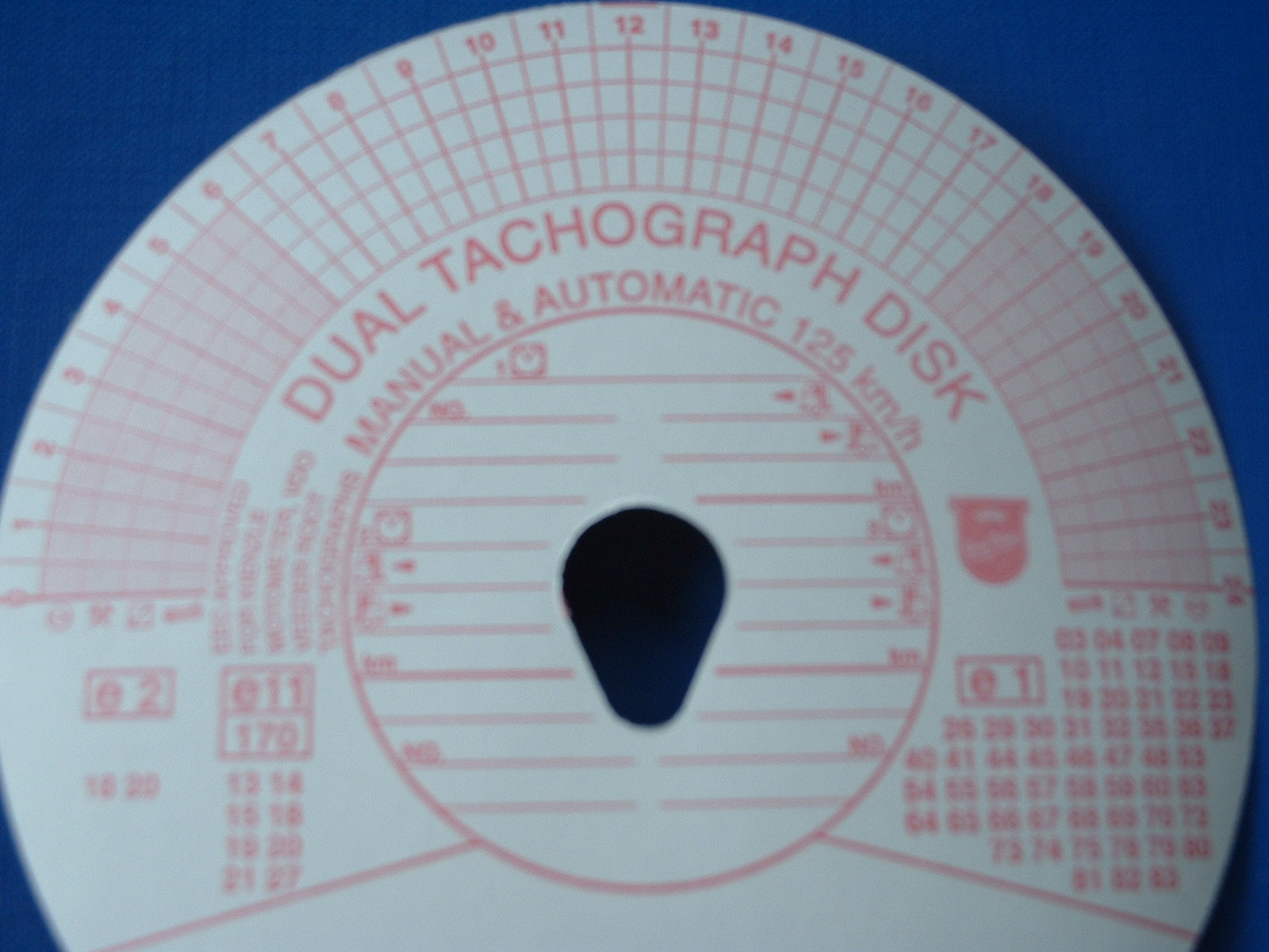 Tachograafschijf